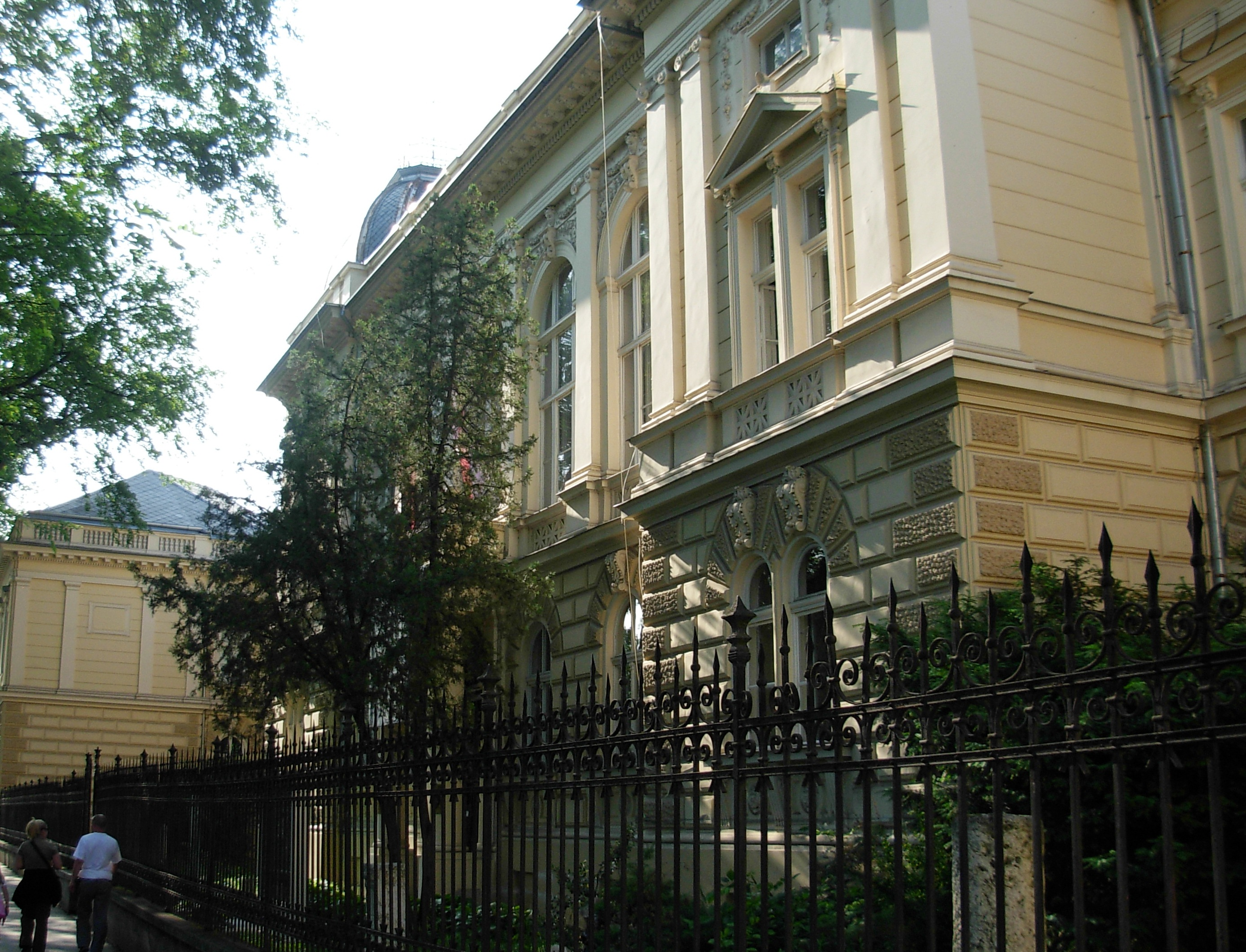 Muzej Vojvodine, jun 2012.